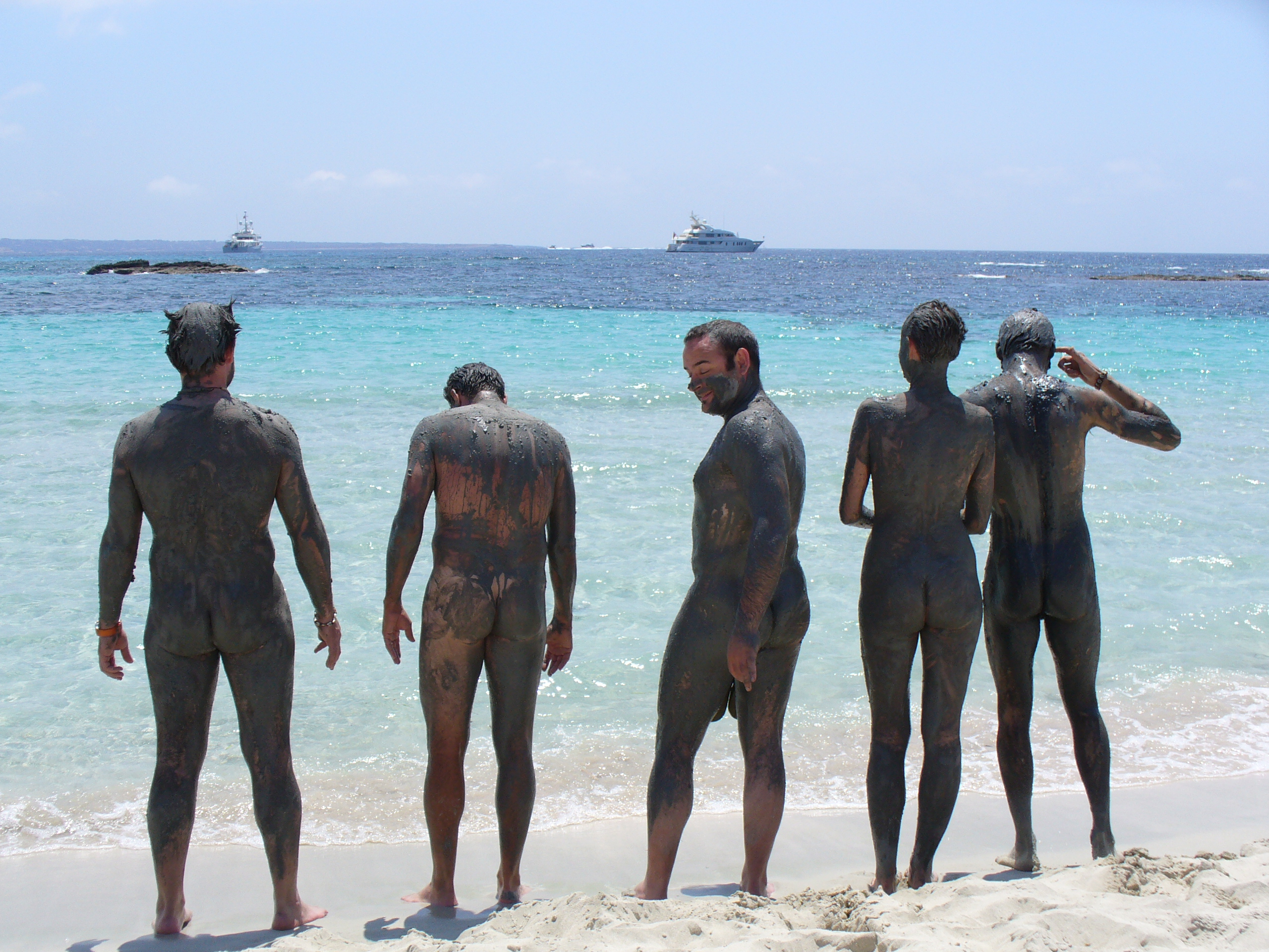 Los cinco que probamos las bondades de los famosos barros de Espalmador antes de volver al agua